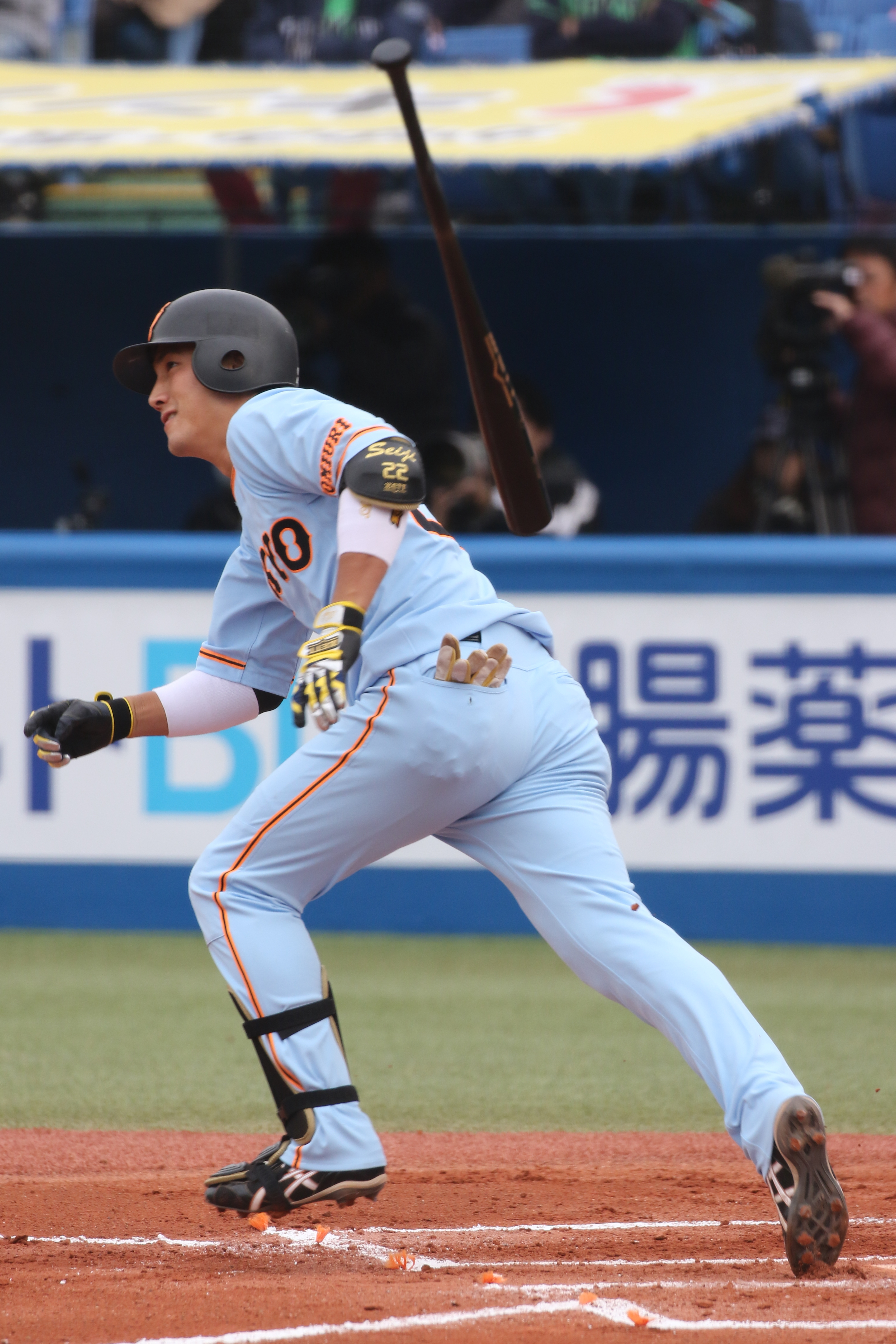 ジャイアンツ小林選手